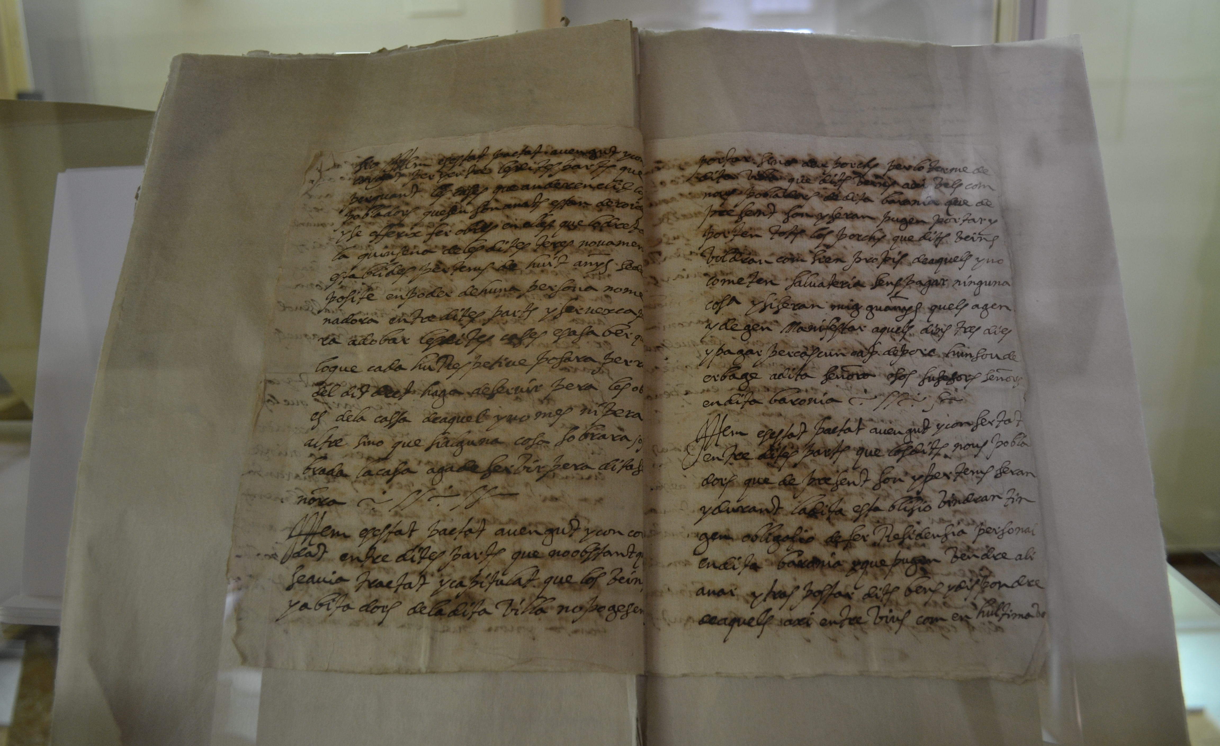 Capítols de la carta pobla d'Orpesa atorgada per na Laura Cervelló i de Mercader als nous pobladors cristians, degut a que les antics l'havien abandonar per anar a poblar otres llocs (21 de gener de 1611). ARV: Reial Audiència, Processos, part 1ª, lletra L, expedient 1496. Arxiu del Regne de València.